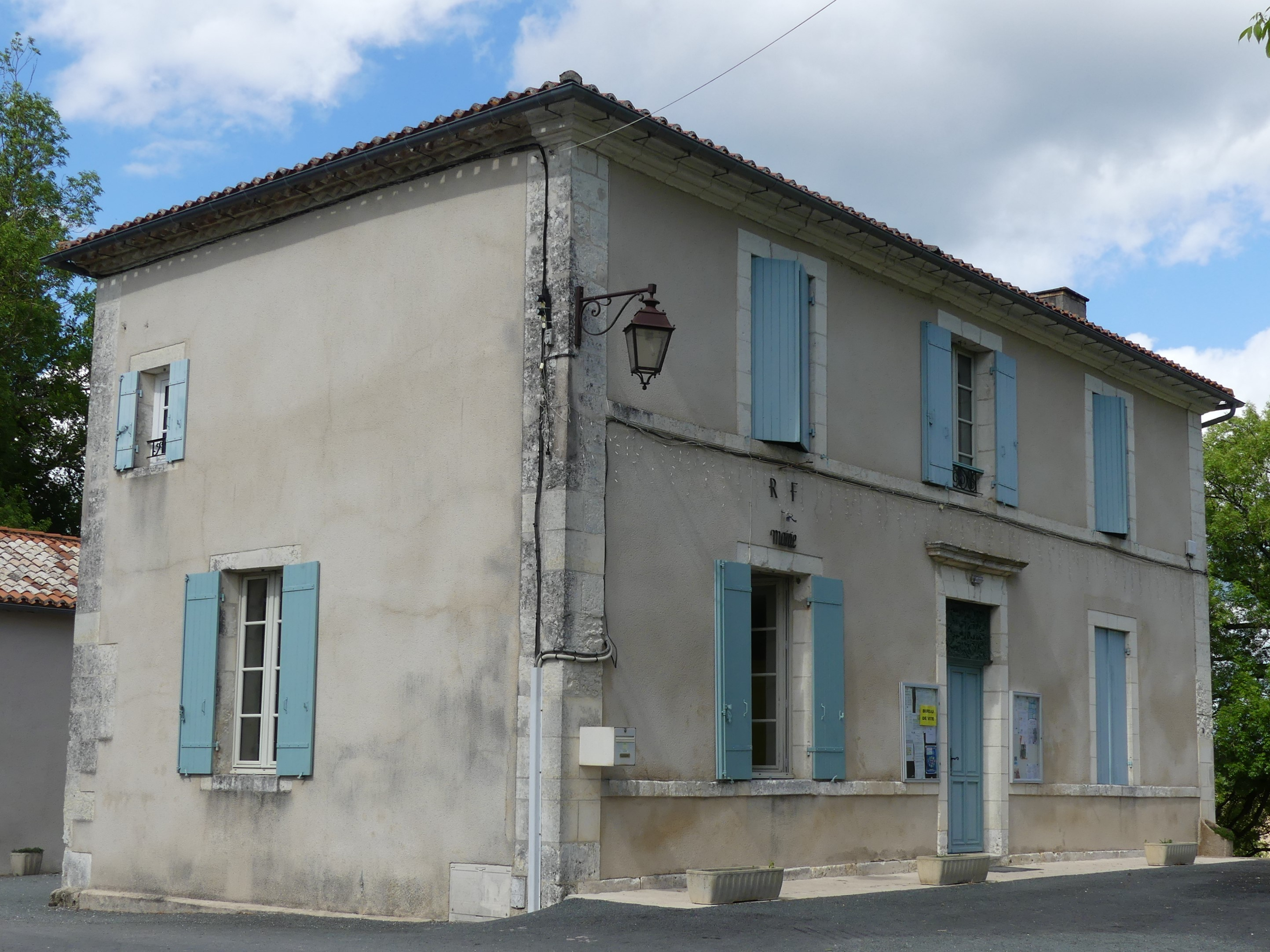 La mairie de Saint-André-de-Double, Dordogne, France.